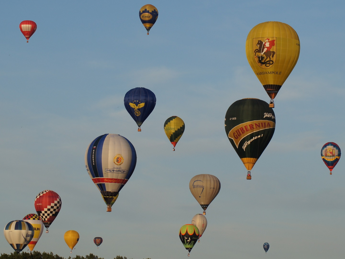 Hot Air Ballooning Women 2016